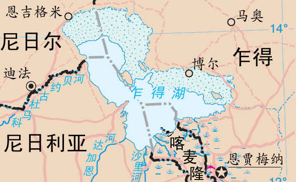 乍得湖地图。